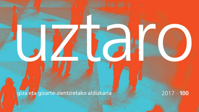 Uztaro aldizkariaren 100. aleko azala